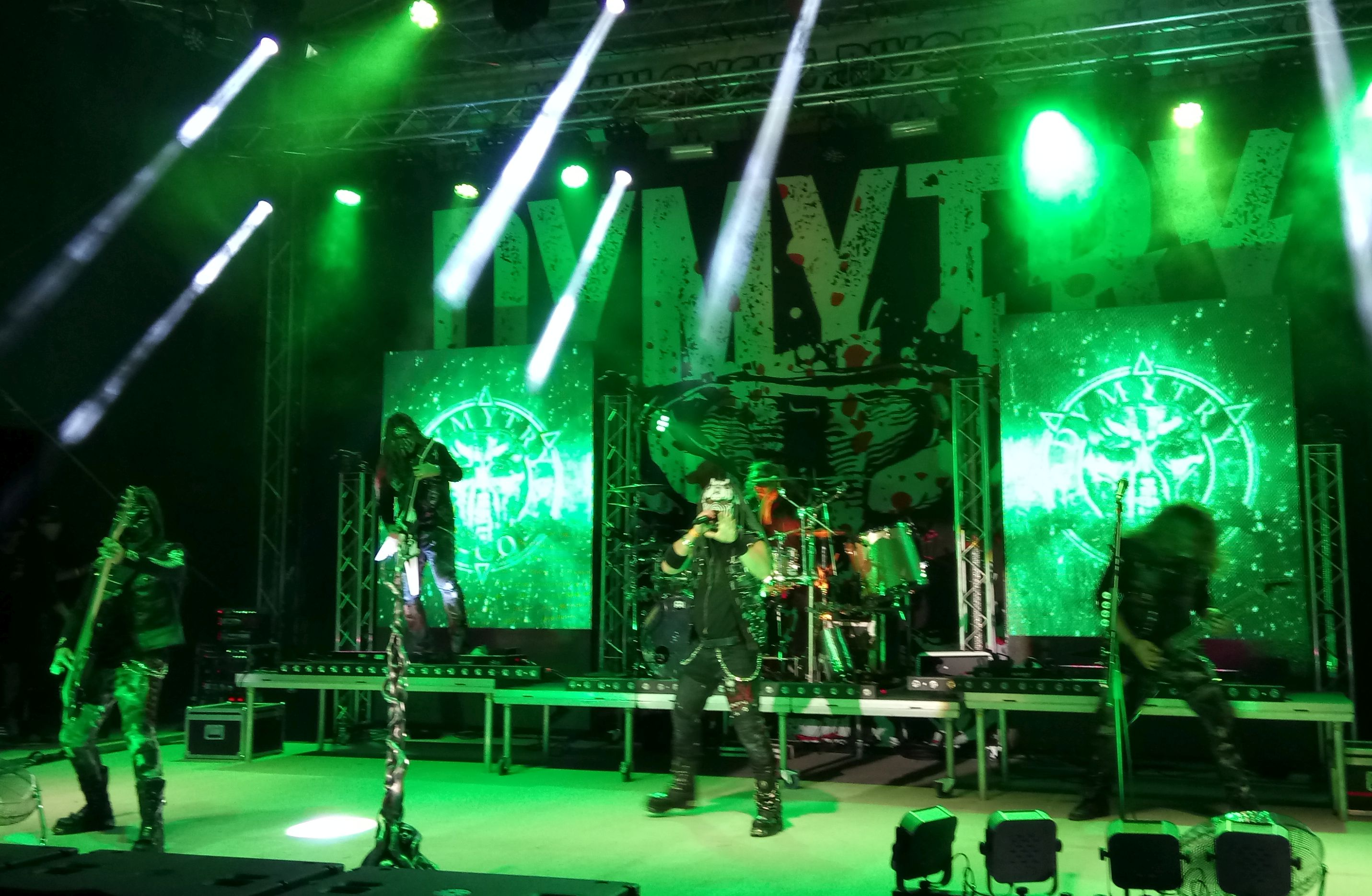 Kapela Dymytry na Mikulovském pivobraní